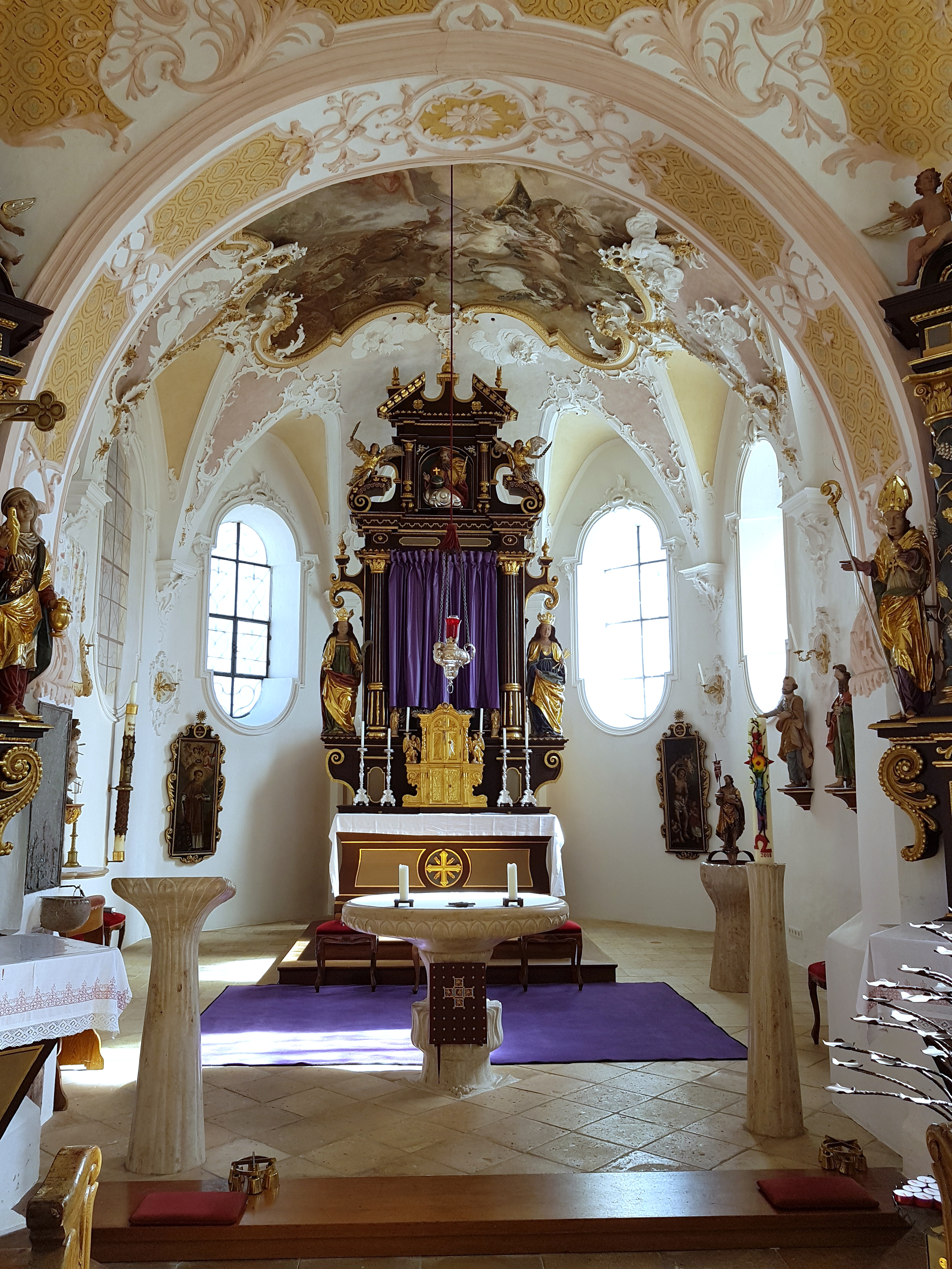 St. Laurentius (Unterbrunn), Chor mit Hochaltar.